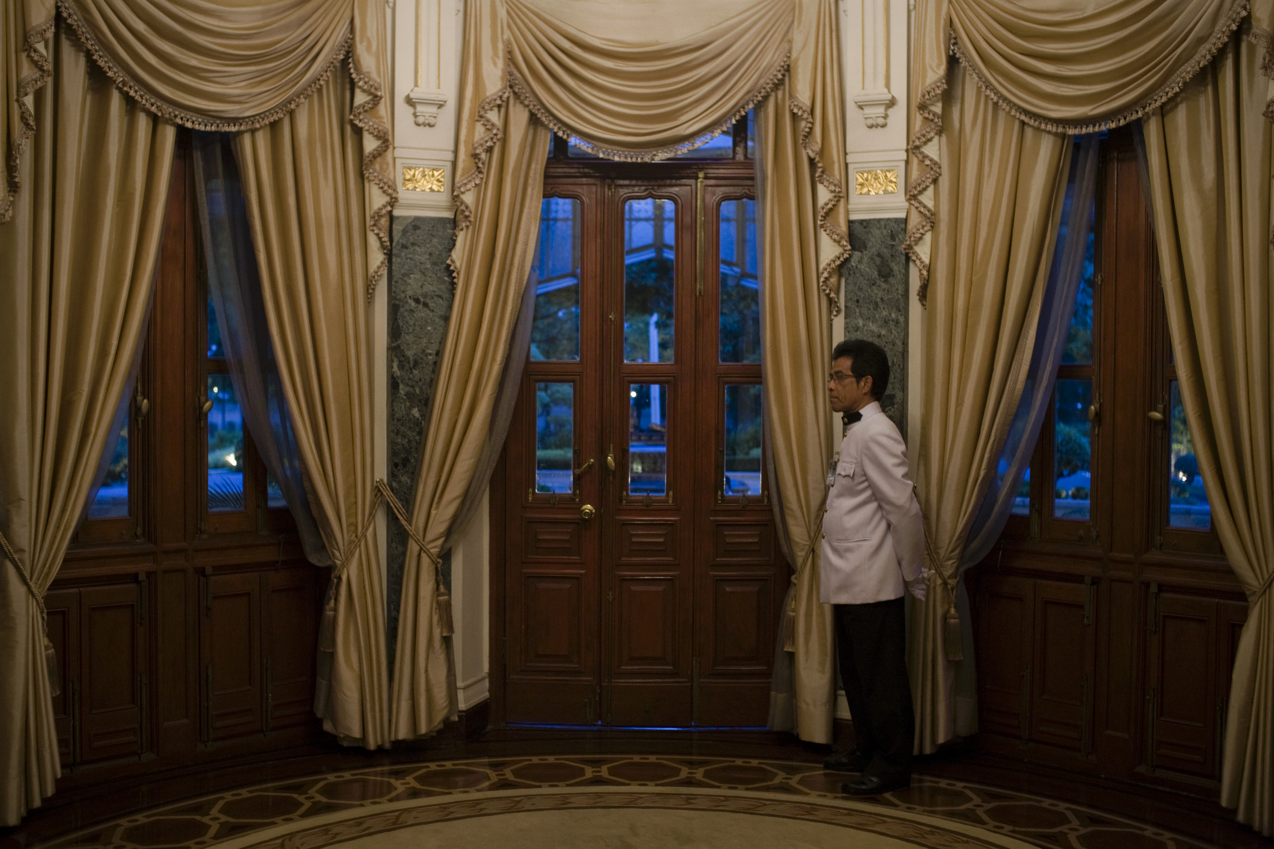 นายกรัฐมนตรีแห่งบาห์เรนเข้าพบนายกรัฐมนตรีในโอกาสเสด็จเยือนไทย ณ ห้องพญานาค บ้านพิษณุโลก วันพฤหัสบดี ที่ 26 สิงหาคม พ.ศ.2553 (Photographer attached to the Prime Minister of the Kingdom of Thailand : Peerapat Wimolrungkarat / พีรพัฒน์ วิมลรังครัตน์)